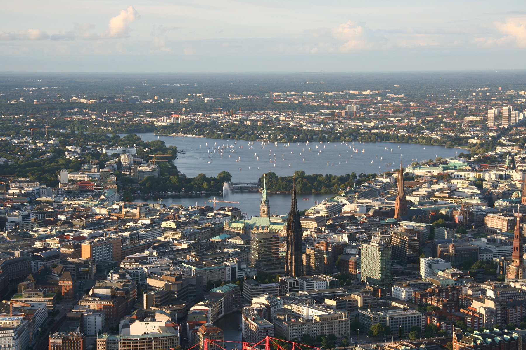 Blick aus Richtung Süden über die Innenstadt auf Binnen- und Außenalster